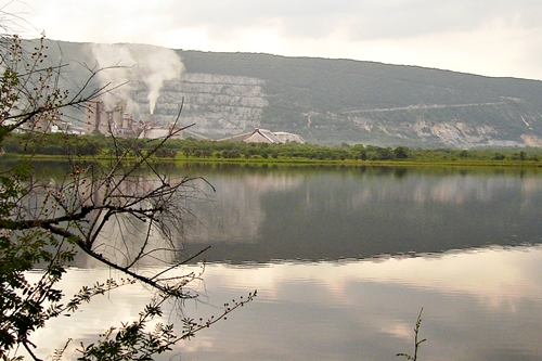 Planta de cementos, ubicada en Las Palmas, Tamuin, S.L.P., Mexico